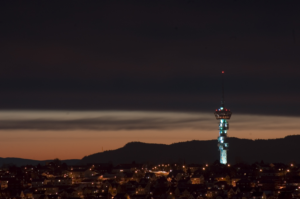 tyholttårnet